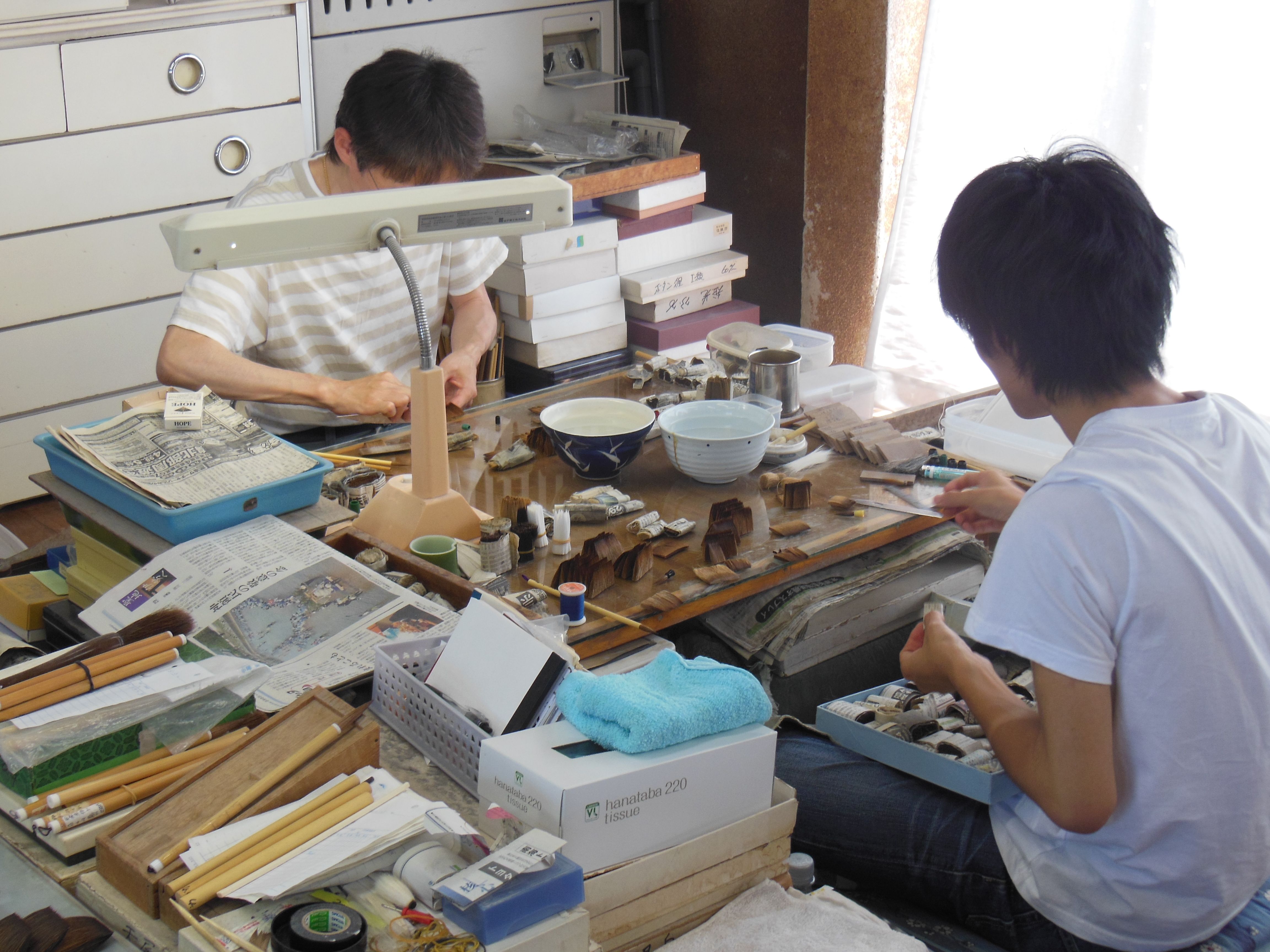 豊橋筆工房